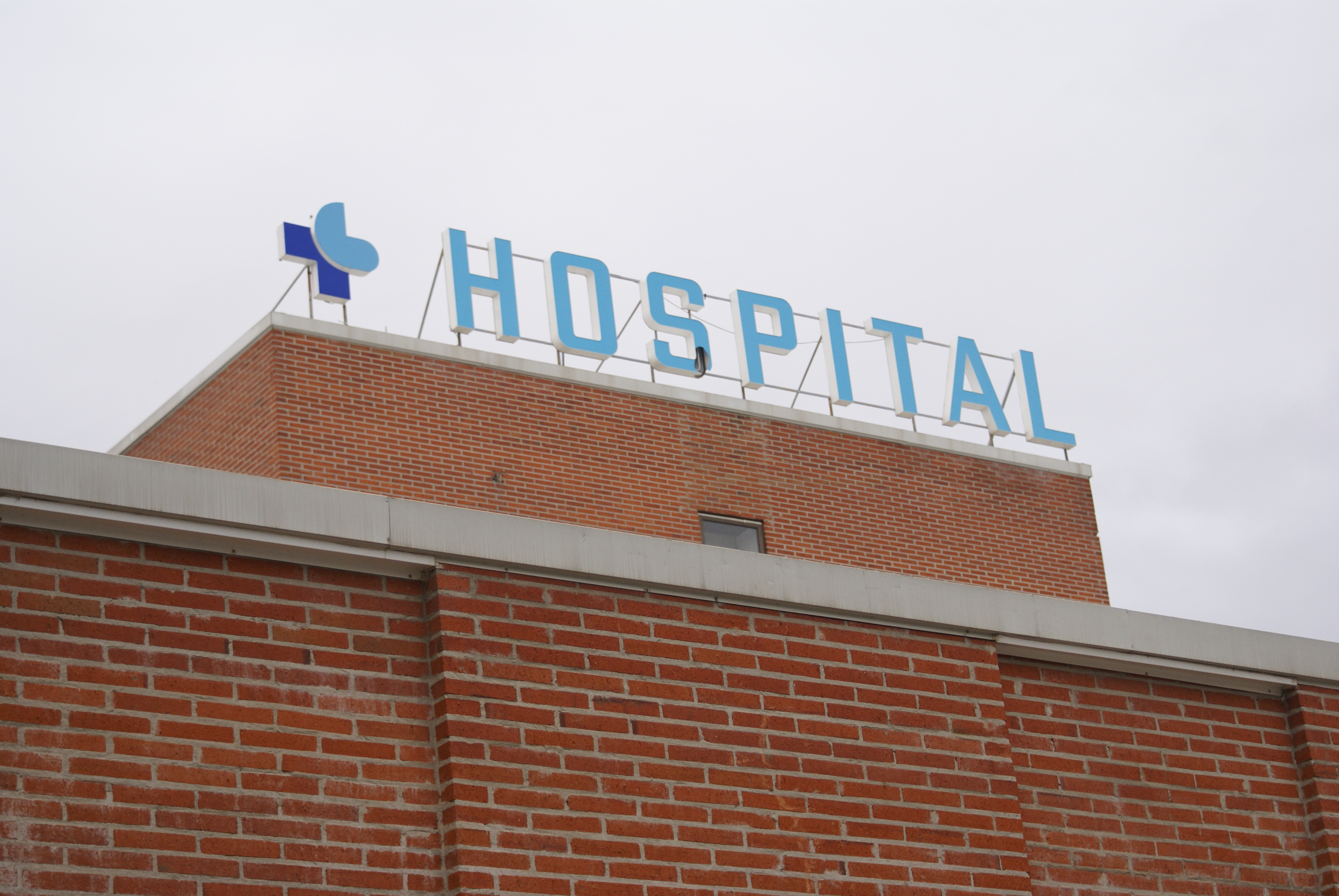 Letrero del Hospital de Medina del Campo